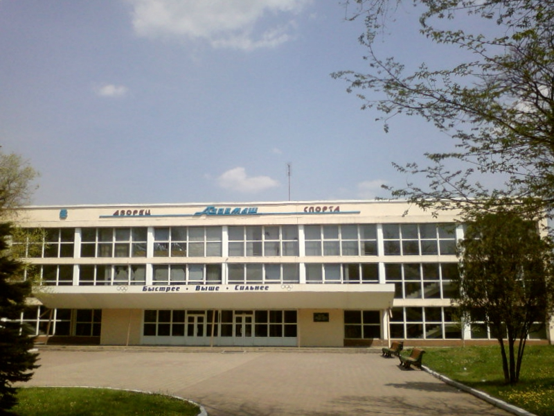 Палац спорту Азовмаш